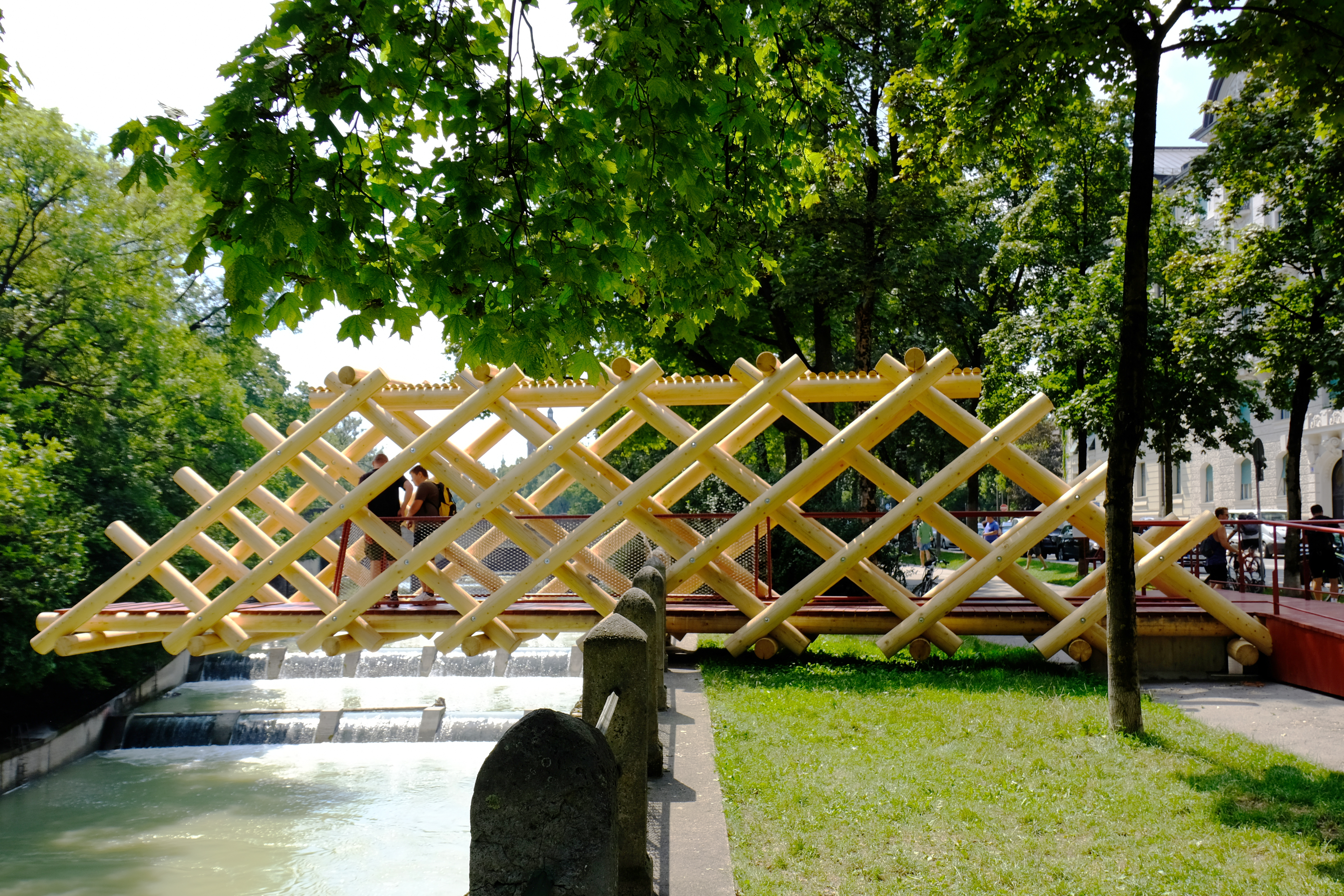 Teil der temporären Installation „Bridge Sprout“ des Tokioter Architekturbüros Bow-Wow in München, gegenüber der Schwindinsel (2020). Die hölzerne, brückenartige Konstruktion ragt ein Stück über die Isar und kann betreten werden.